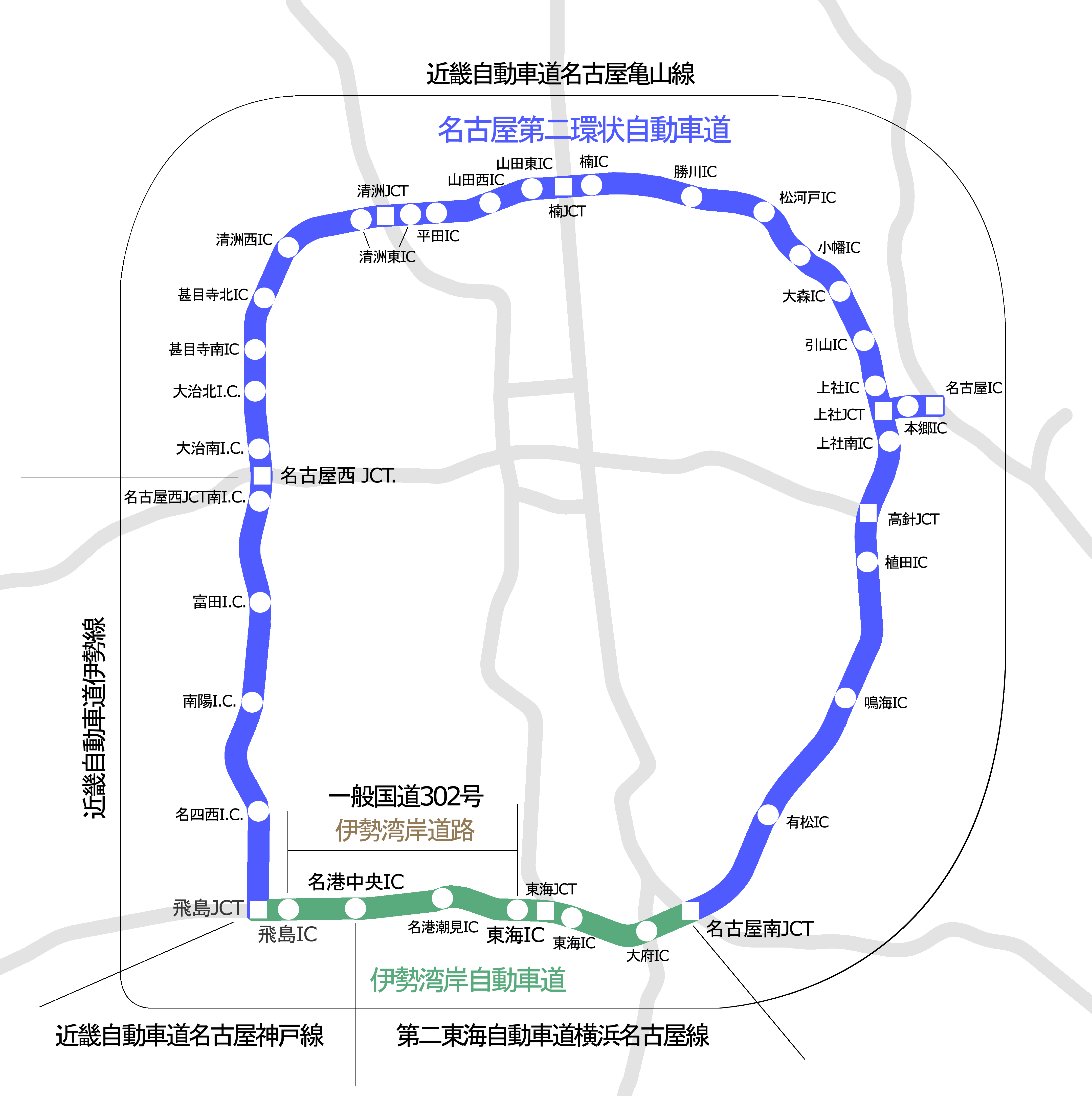 名古屋環状2号線 法定路線名